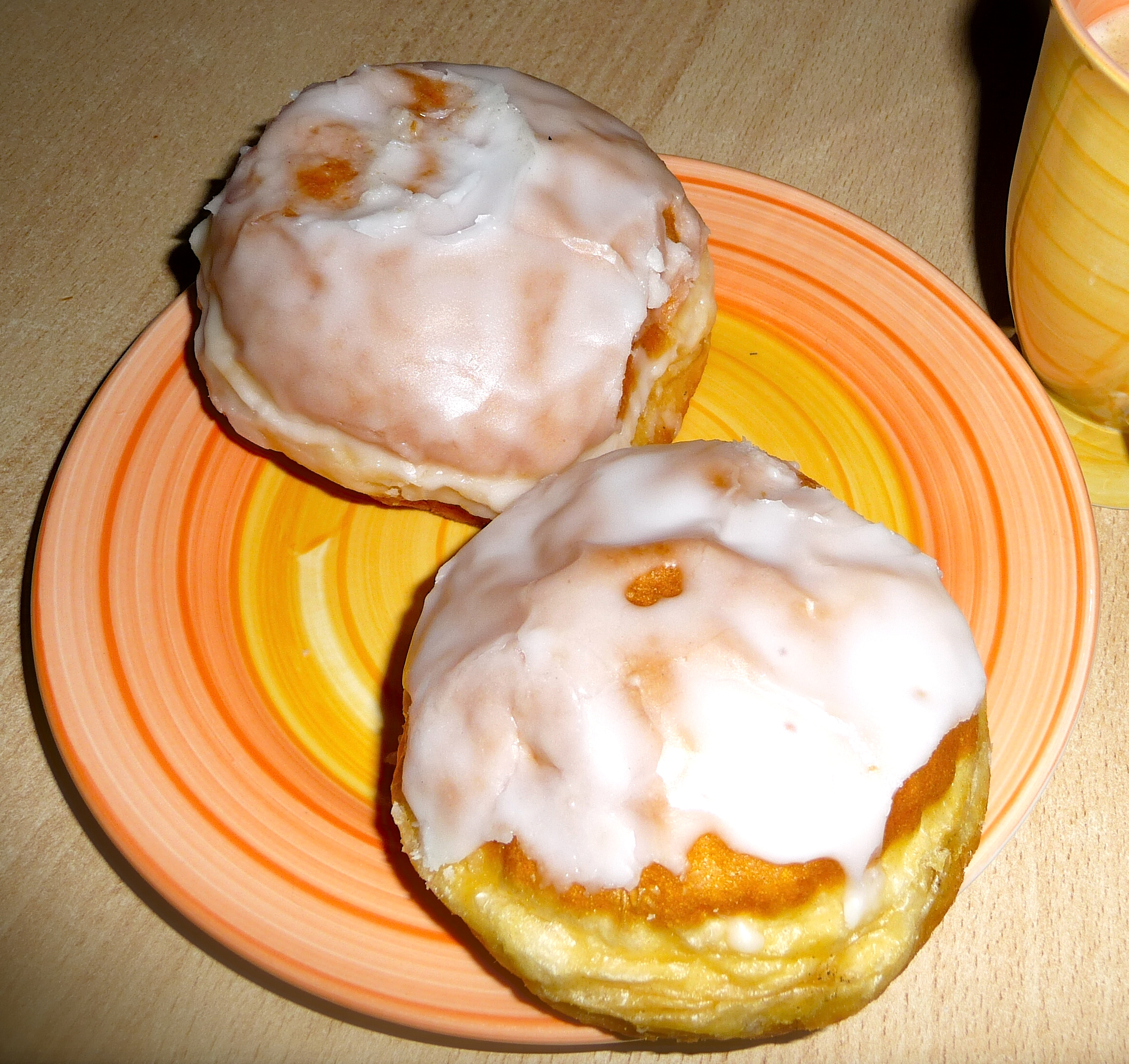 Zwei Berliner Pfannkuchen mit Zuckerguss (Fondant).